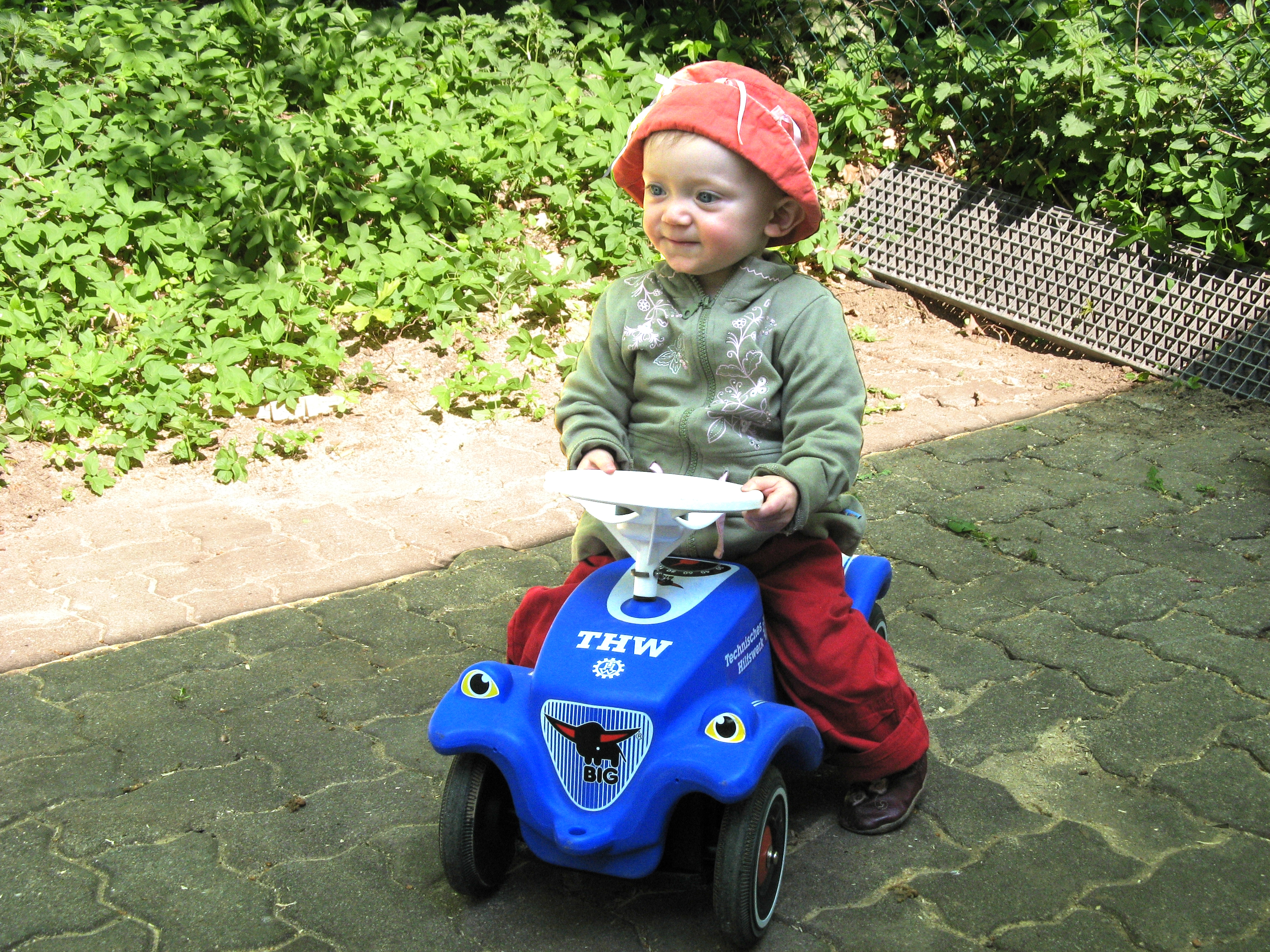 Mein Tochter Vivien auf einer THW Ausführung eines BIG Bobby-Cars